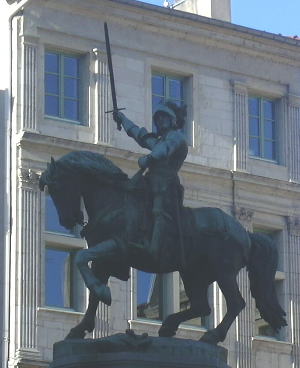 Cette photo représente la statue du duc René II de Lorraine se trouvant sur la place Saint-Epvre à Nancy. Elle a été prise par User:Odejea le 30 octobre 2005